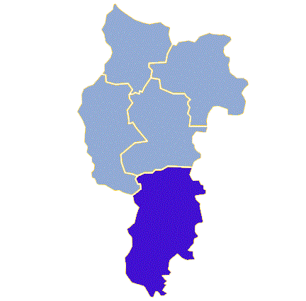 Powiat słubicki - Gmina Cybinka